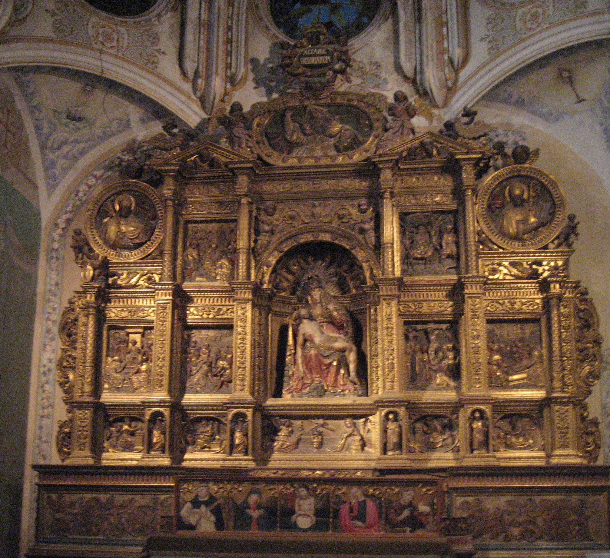 Altar de La Piedad realizado por Jeroni Xanxo. Museo diocesano de Urgel (Cataluña) (España)